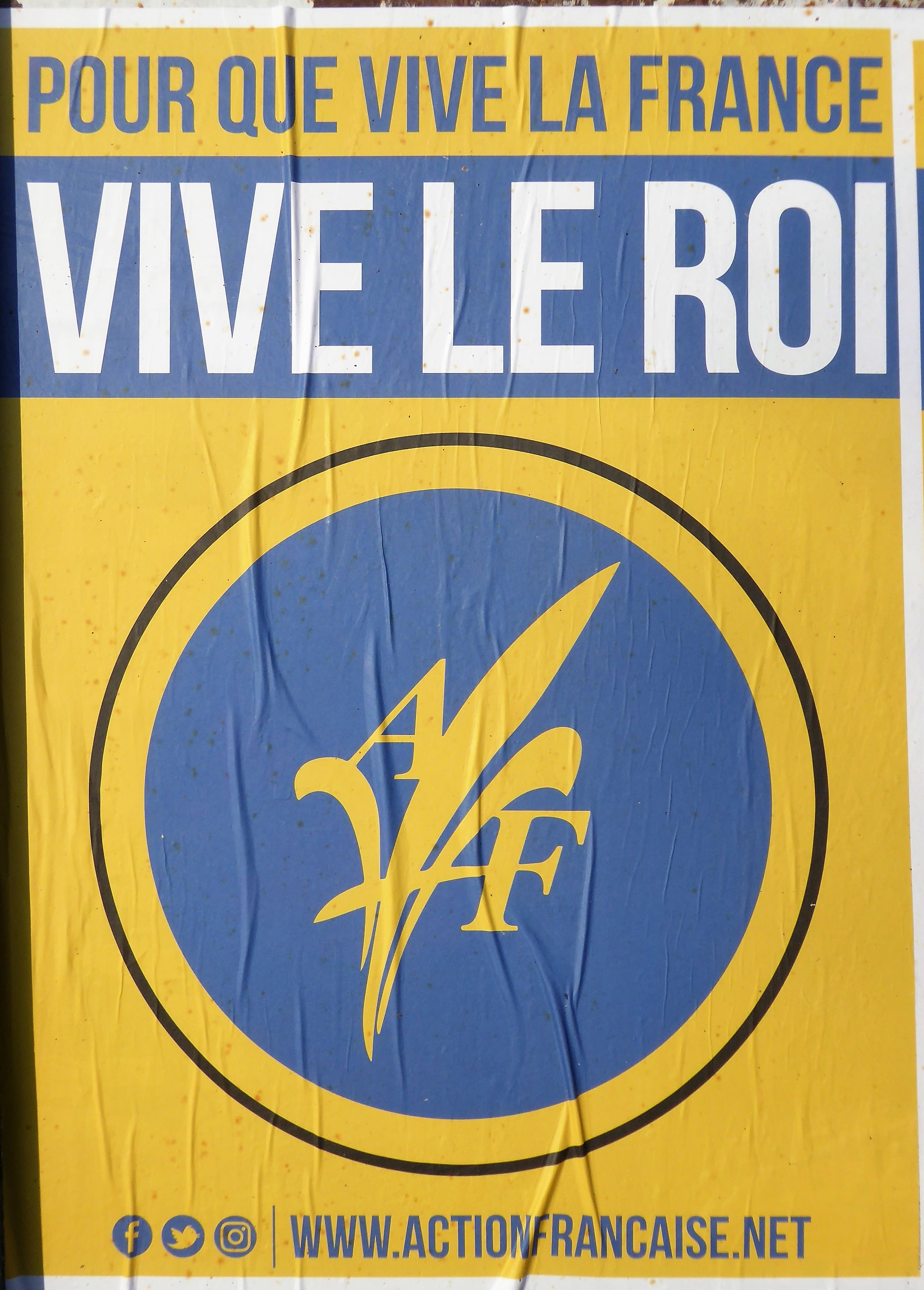 Vive le Roi